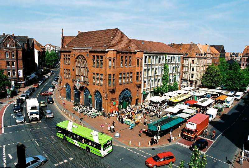 Der Lindener Marktplatz im Juni 2006